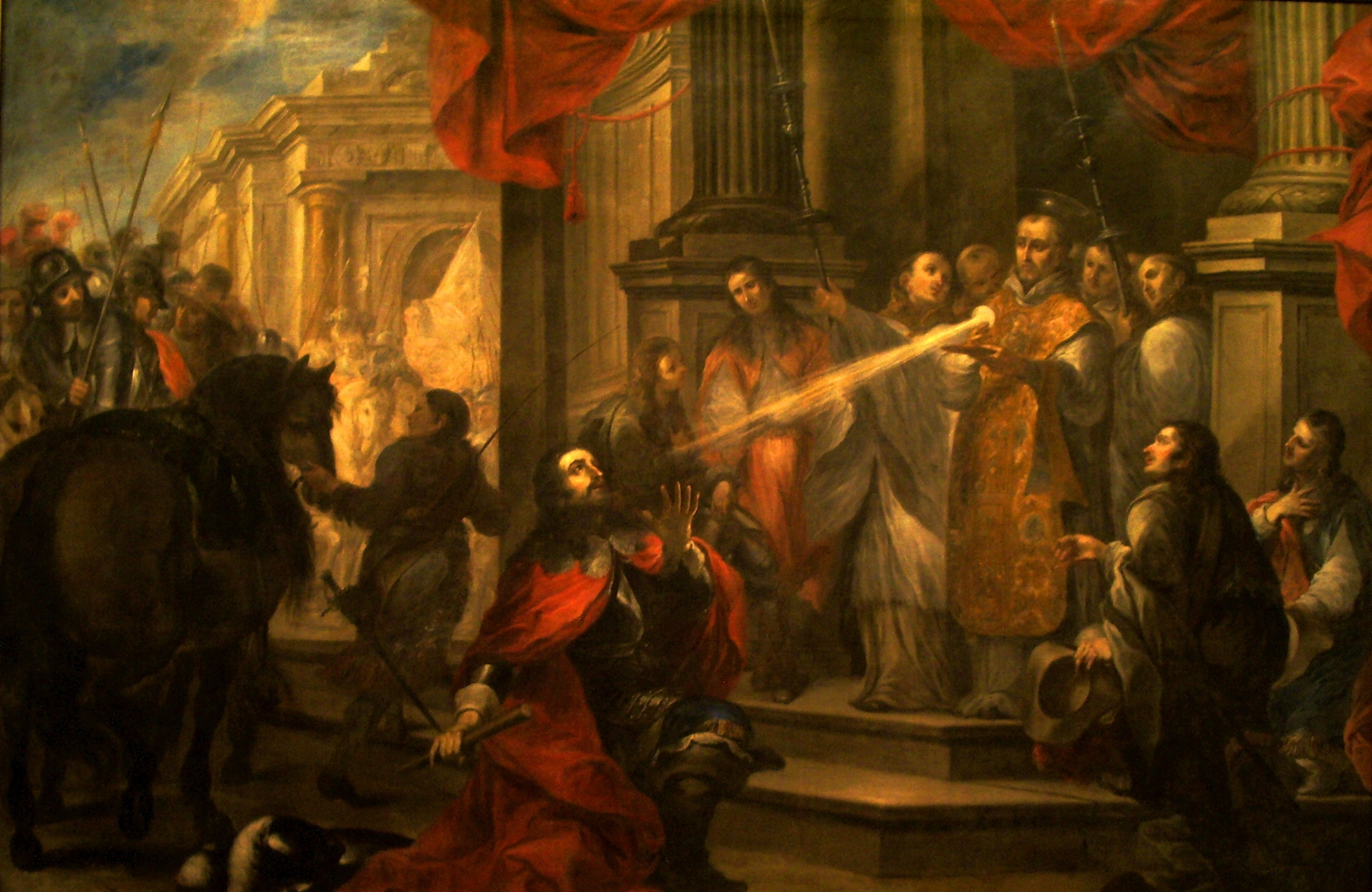 La obra representa la conversión del duque Guillermo X de Aquitania, que fue llevada a cabo por San Bernardo de Claraval. Cuadro perteneciente a una serie sobre la vida de San Bernardo destinada al monasterio de Veruela (provincia de Zaragoza, España) y conservada en el Museo de Zaragoza.